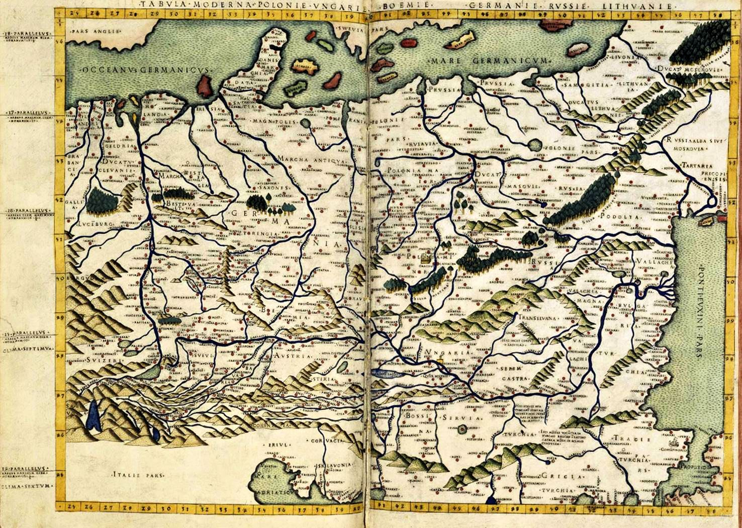 Russia Alba sive Moscovia (Белая Русь или Московская)